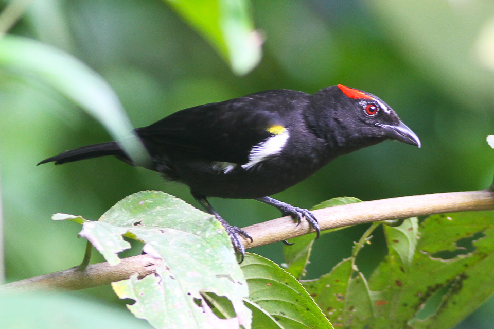 El Paujil Reserve, Boyaca